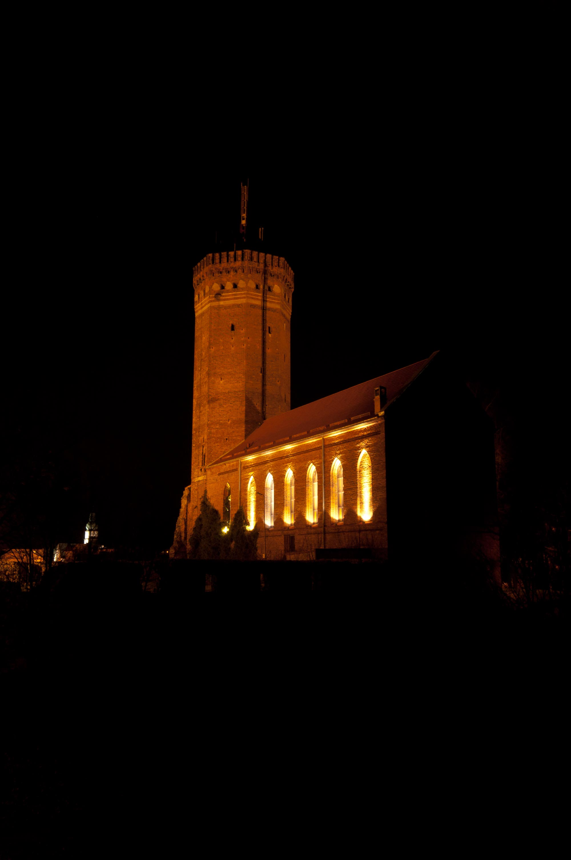 Zamek w Człuchowie